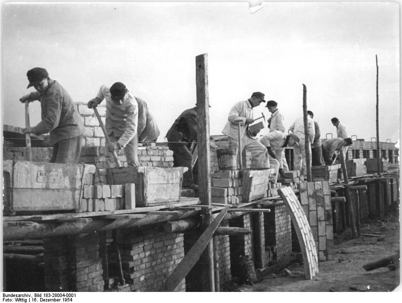 Röppisch, LPG, Bau eines Stalls Zentralbild TBD-Wittig 2 Motive-16.12.1954 2667 UBz: Die Lehrlings-Brigade "Aktiv - Petermann" der Bauunion Gera arbeitet am Jungviehaufzuchtstall der LPG "Freundschaft".